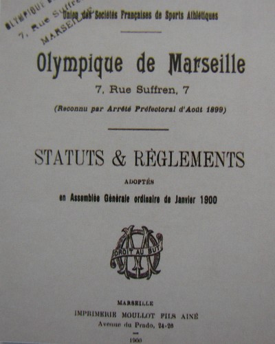 Statuts et réglements de l'Olympique de Marseille, janvier 1900.